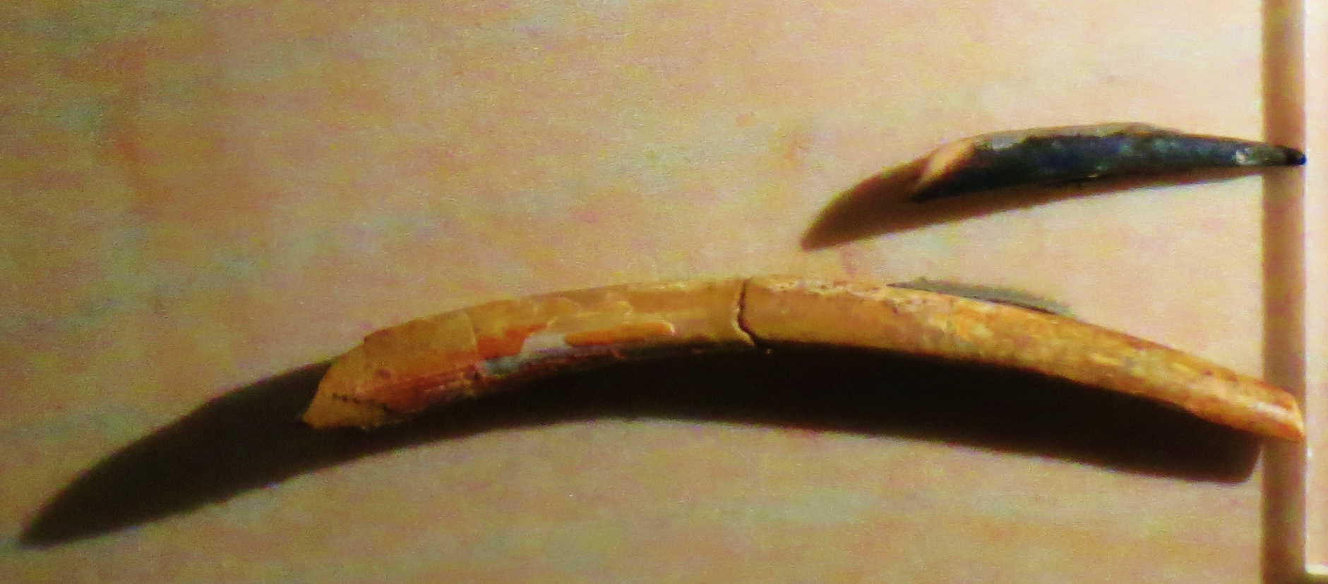 Fossil of Nigersaurus, an extinct reptile- Took the photo at Museo di Storia Naturale di Venezia